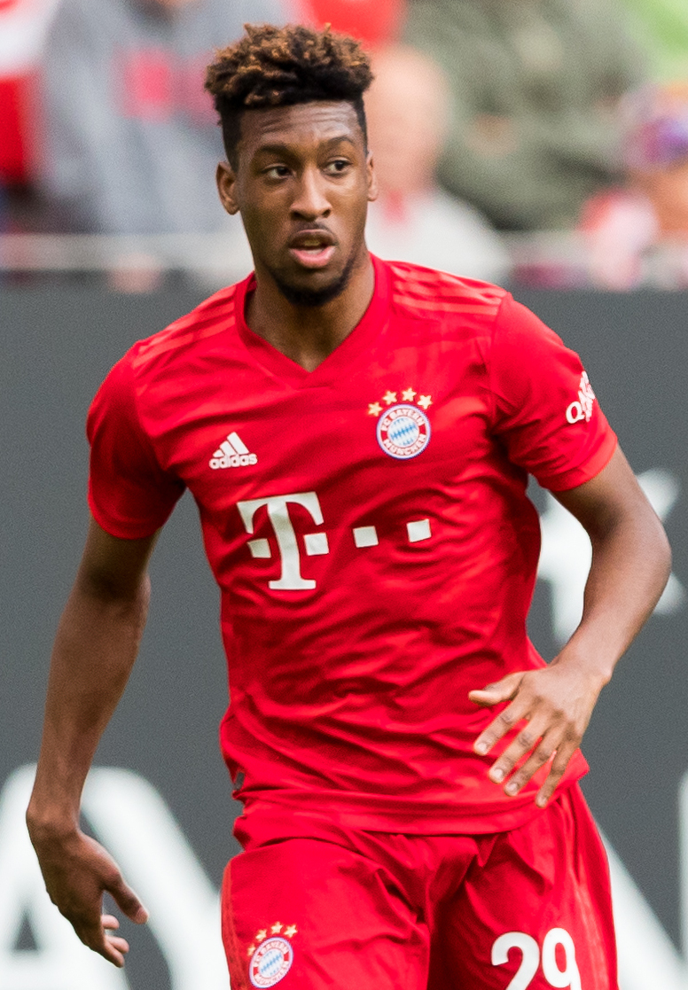 during 1.FC Kaiserslautern vs FC Bayern München at Fritz-Walter-Stadion, Kaiserslautern, Rheinland-Pfalz, Germany on 2019-05-27, Photo: Sven Mandel